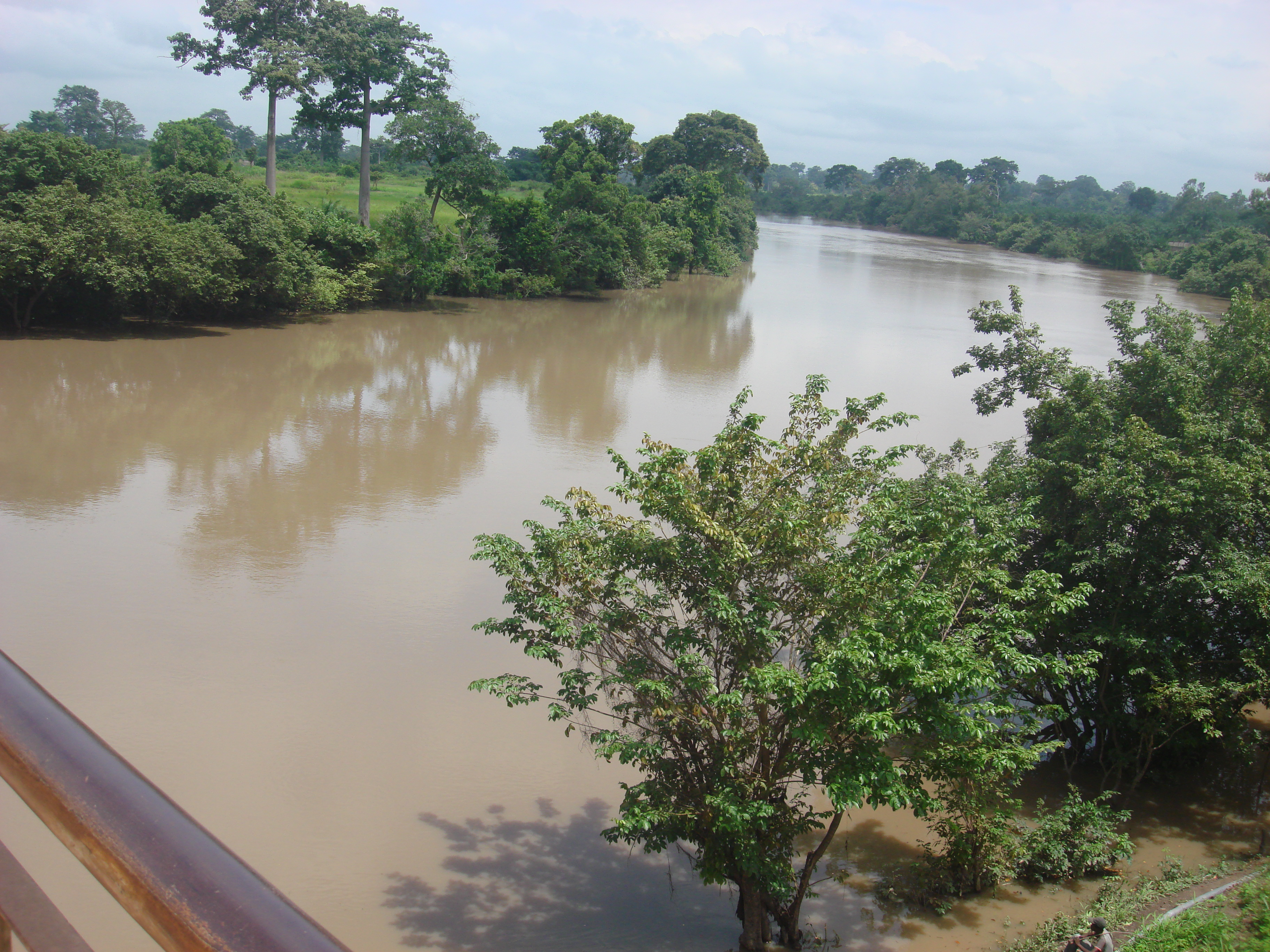 Affluent du fleuve Bandama (Bandama rouge) au niveau de Bouaflé, Côte d'Ivoire